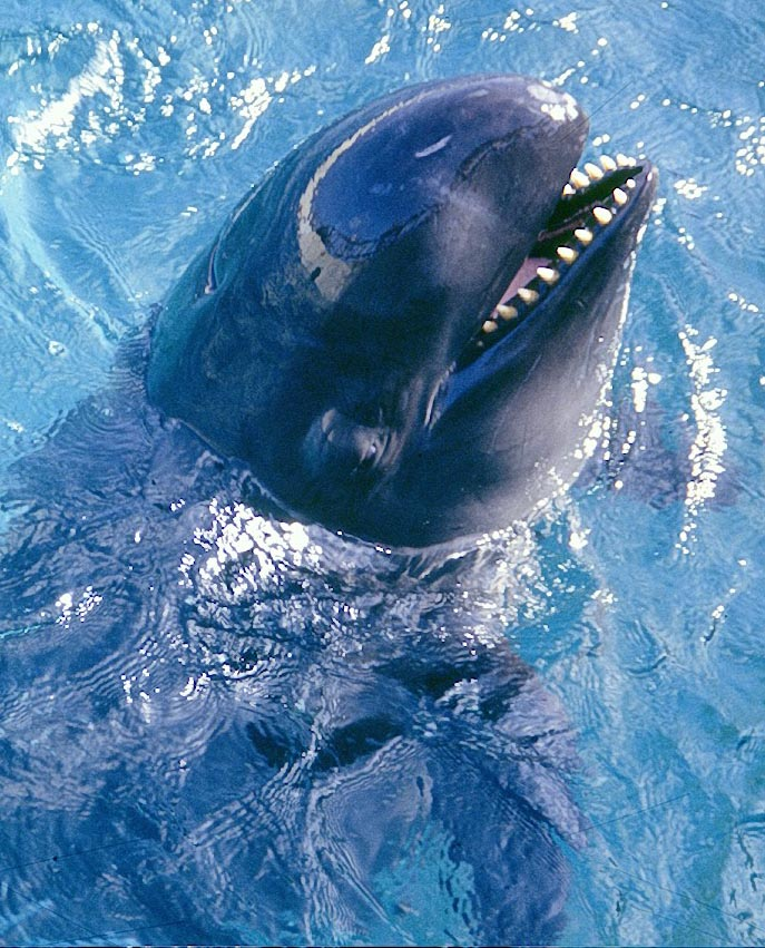 Pseudoorca Crassidens - False Killer Whale